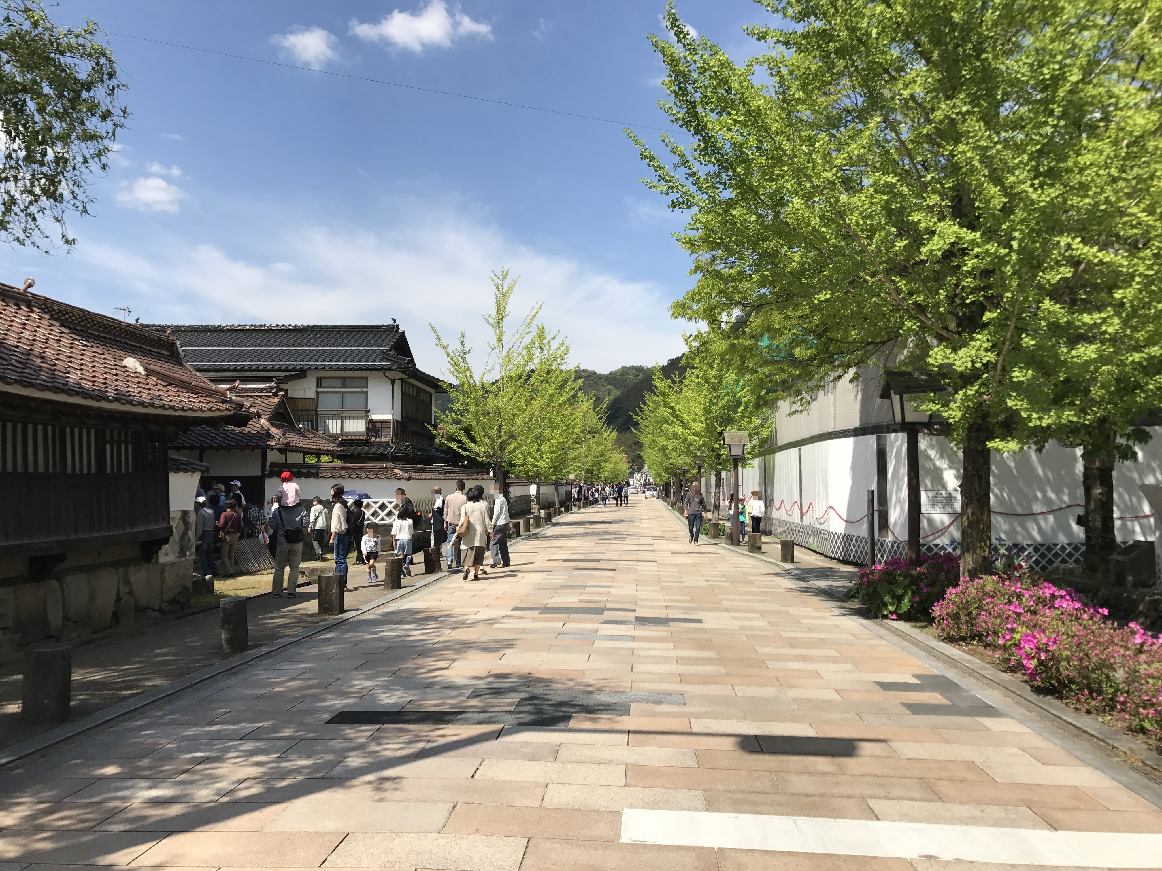 島根県鹿足郡津和野町・殿町通り